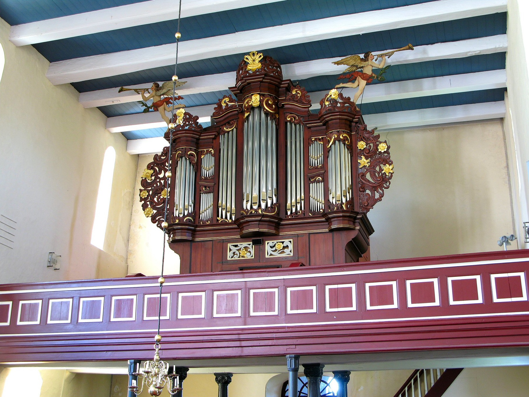 Orgel in Arle, Landkreis Aurich